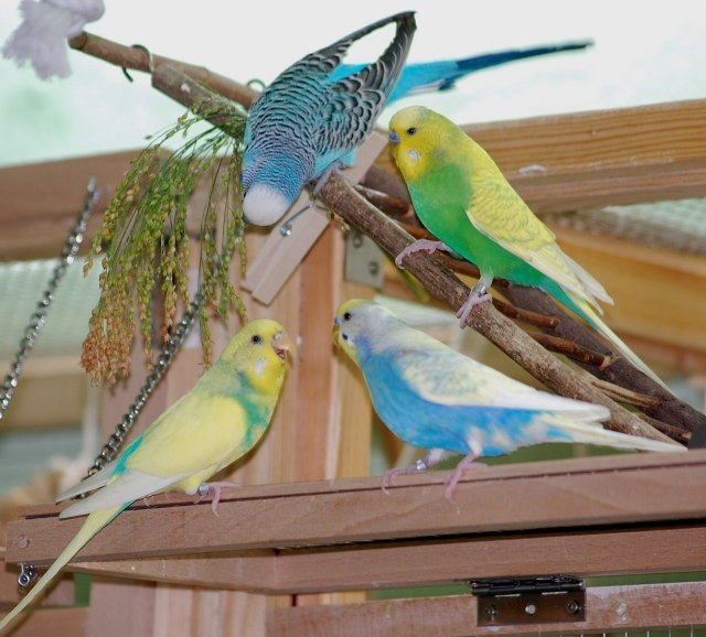 vier Wellensittiche beim fressen von Silberhirse